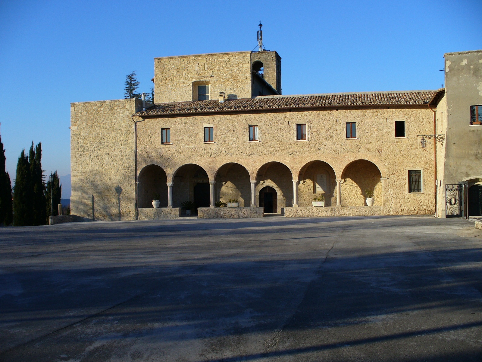 Panorama del Chiostro di Santa Maria dei Lumi, 3 immagini.Civitella del Tronto, Chiostro di Santa Maria dei Lumi